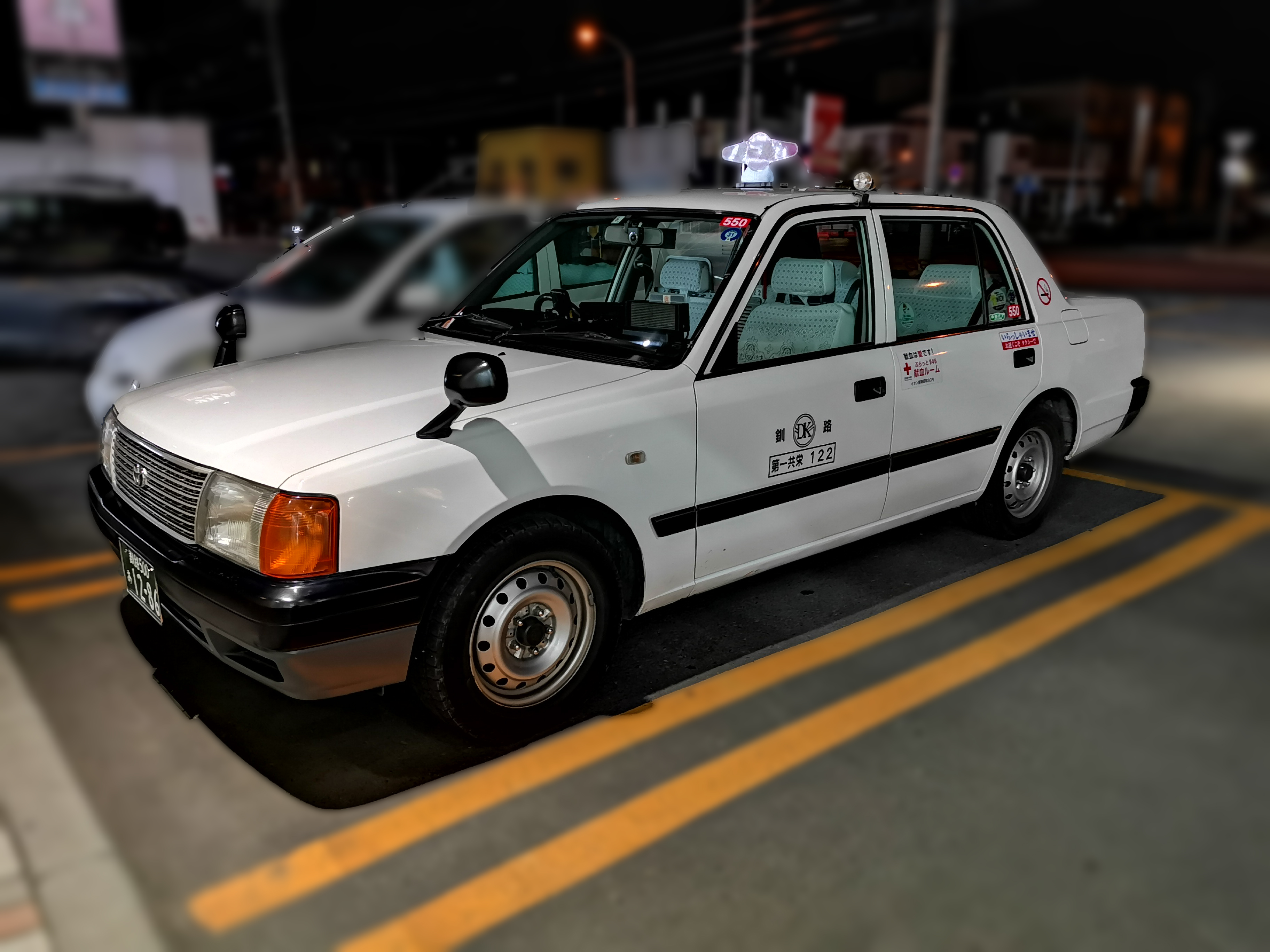 第一共栄交通の122号車（トヨタ・コンフォート）